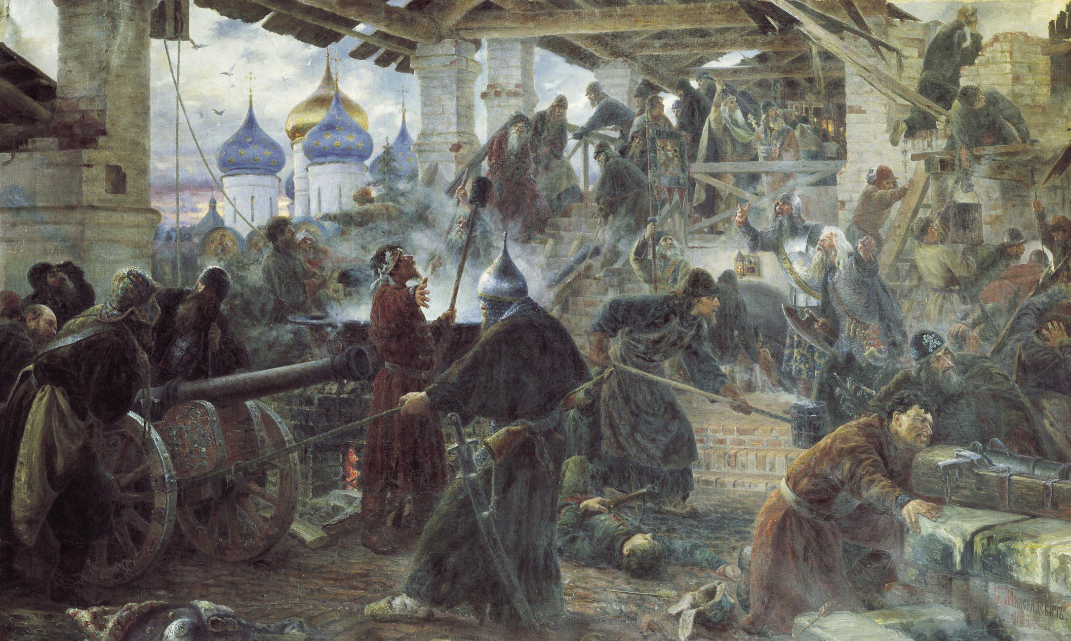 Это картина русского художника Сергея Милорадовича: «Оборона Троице-сергиевой лавры». Картина описывает эпизод смутного времени - осаду войсками Сапеги Троице-Сергиевой Лавры